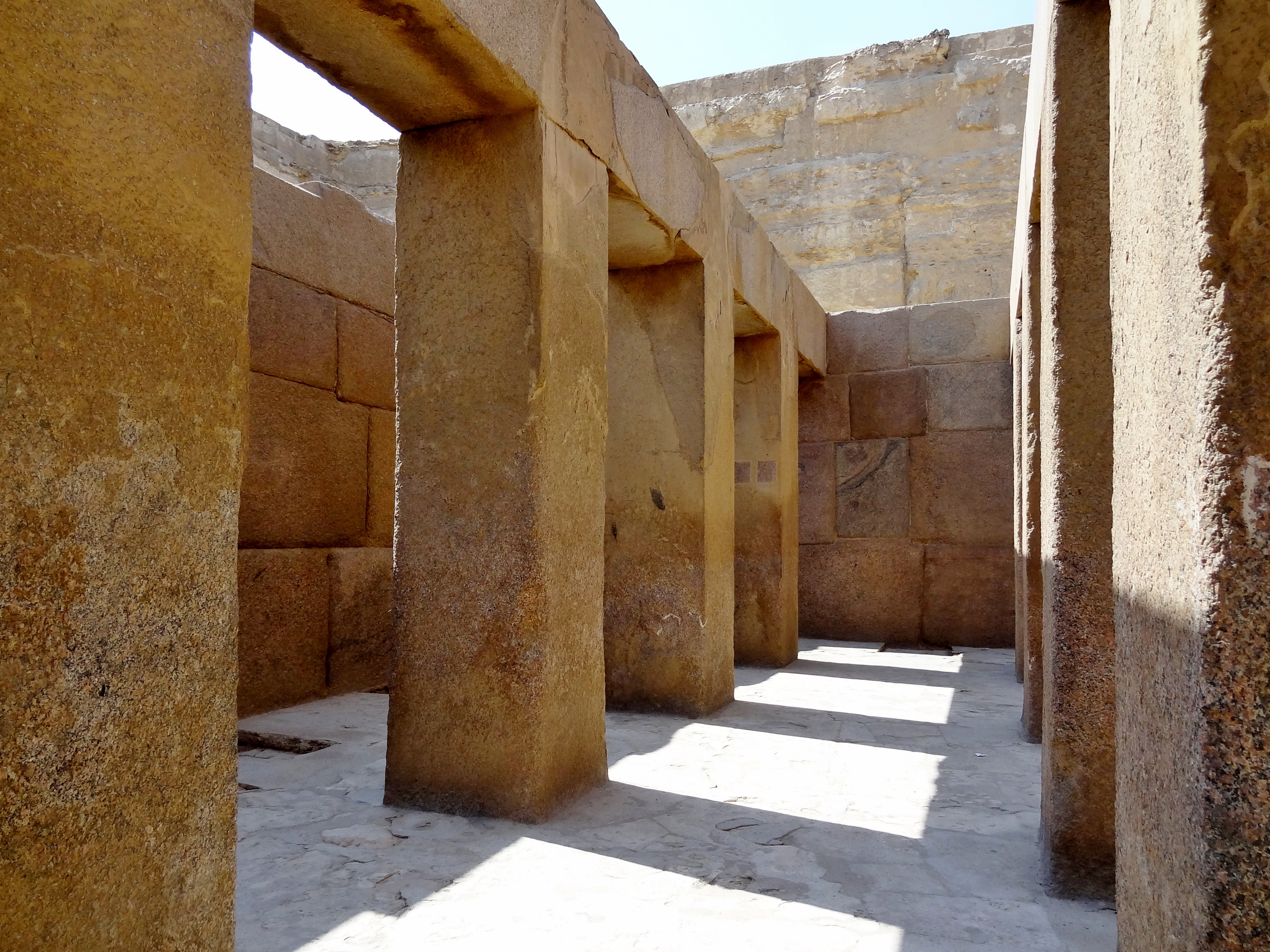 Taltempel der Chephren-Pyramide in Giseh, Ägypten